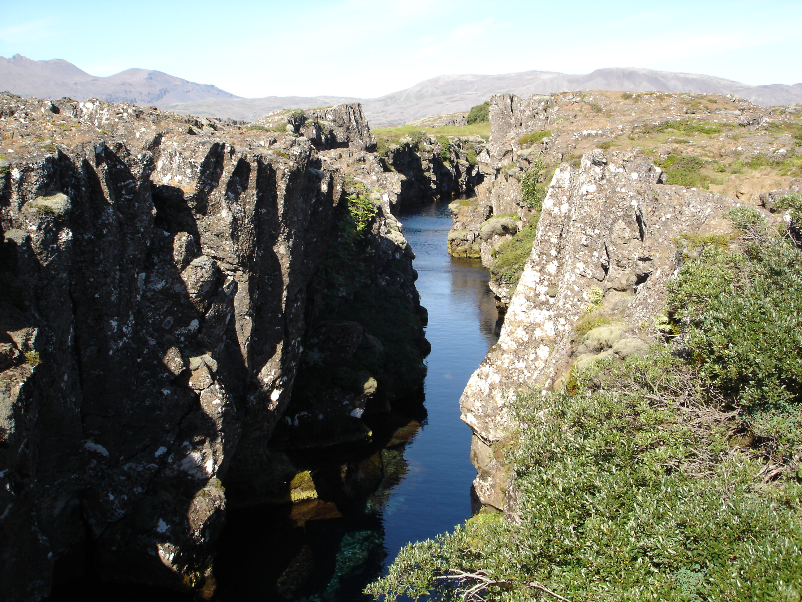 rendo la mia foto di pubblico dominio!!!